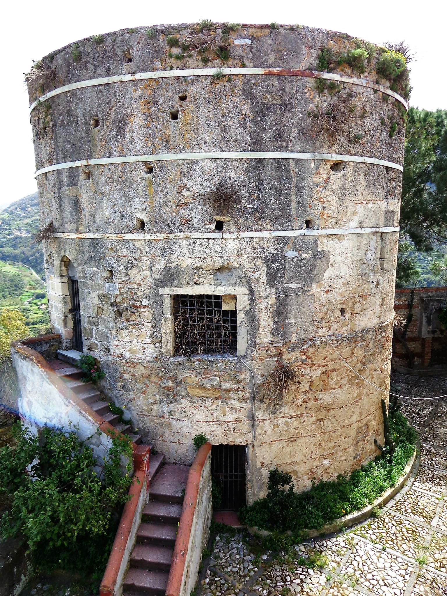 Torre, foto presente sulle pagine personali (Facebook, Panoramio, etc.).